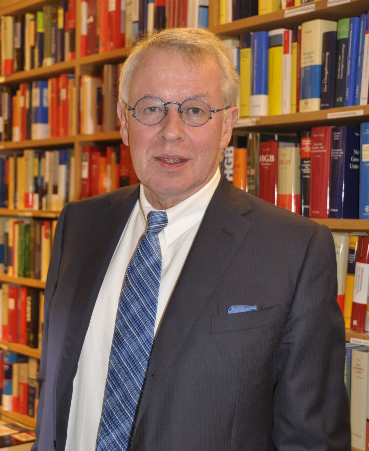 Gerhard Strate am 10. Dezember 2014 bei der Lesung seines Buches Der Fall Mollath in Hamburg